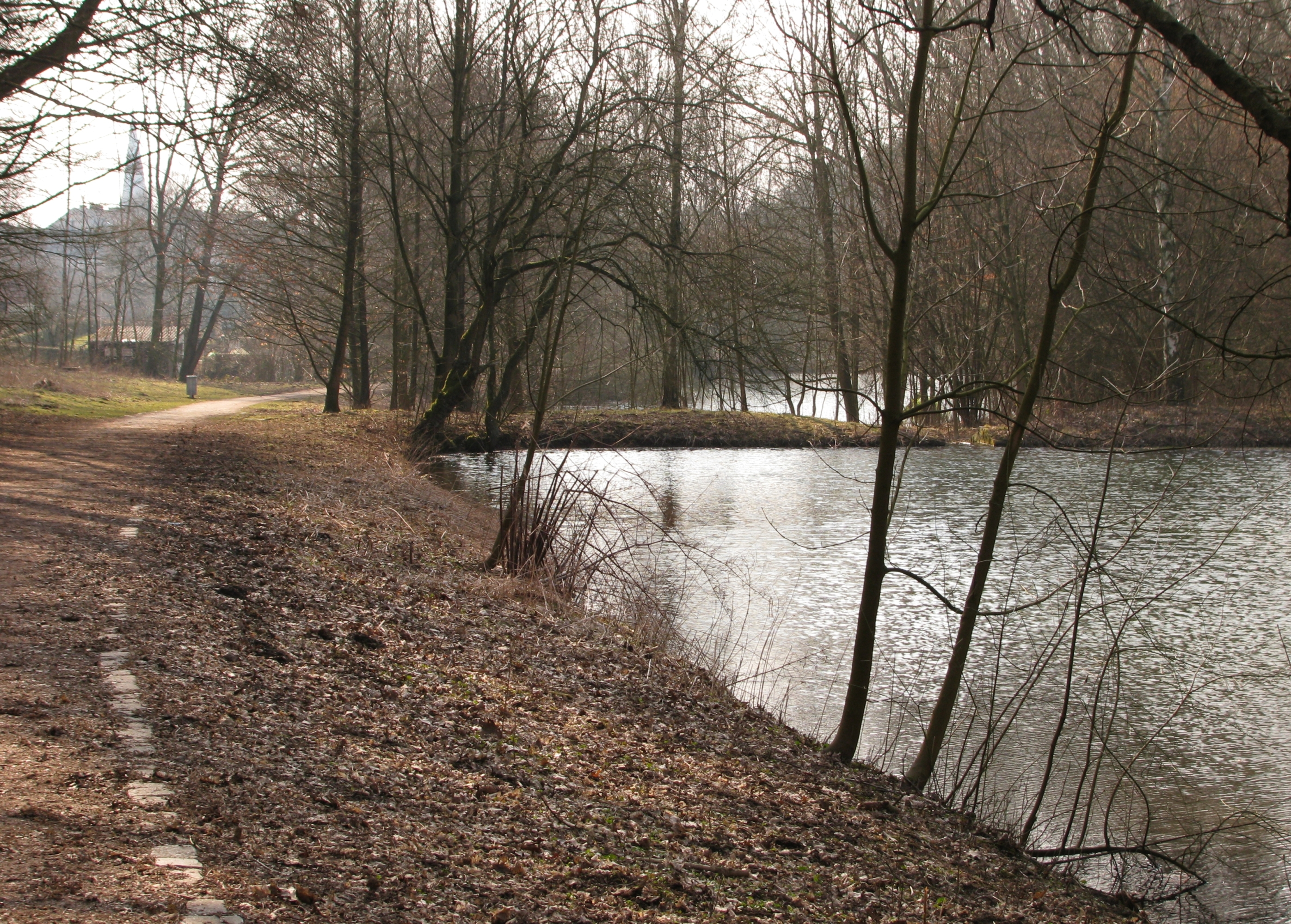 Biggeteich in Bochum, dahinter der Grumeteich